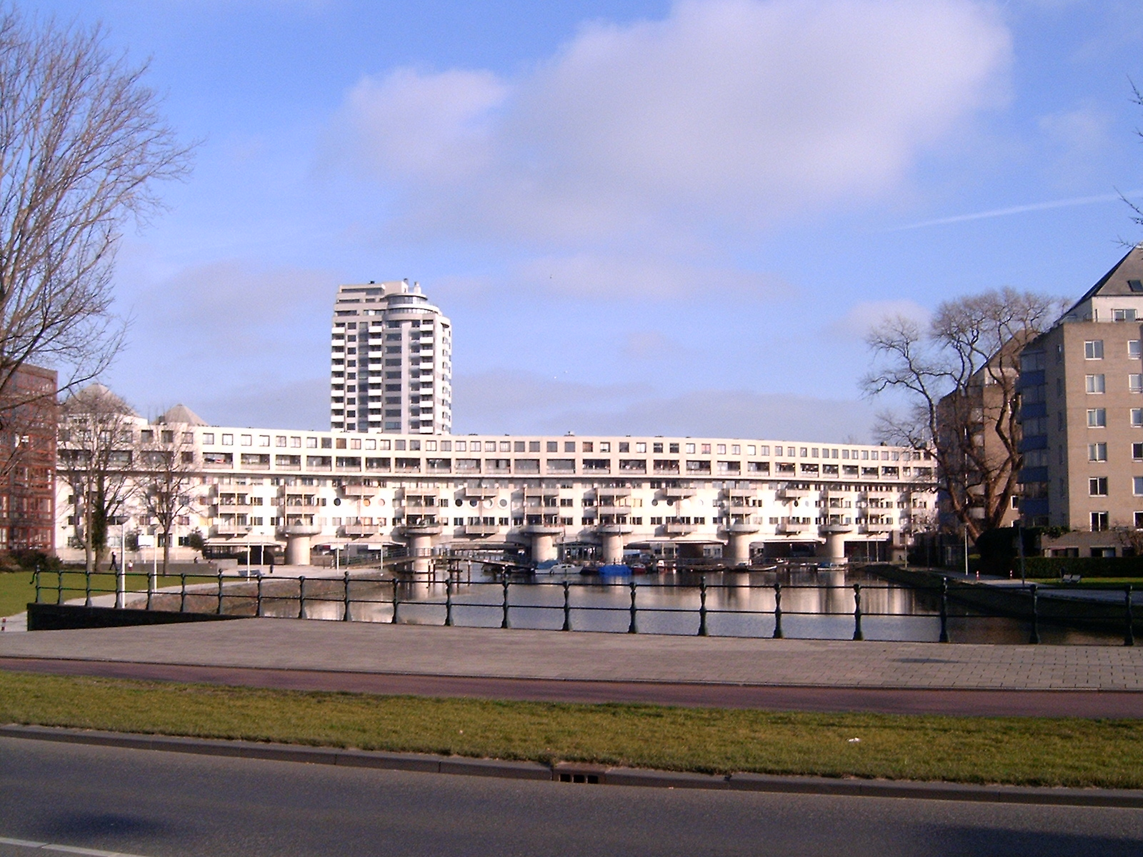 Amsterdam Oost gebouwen